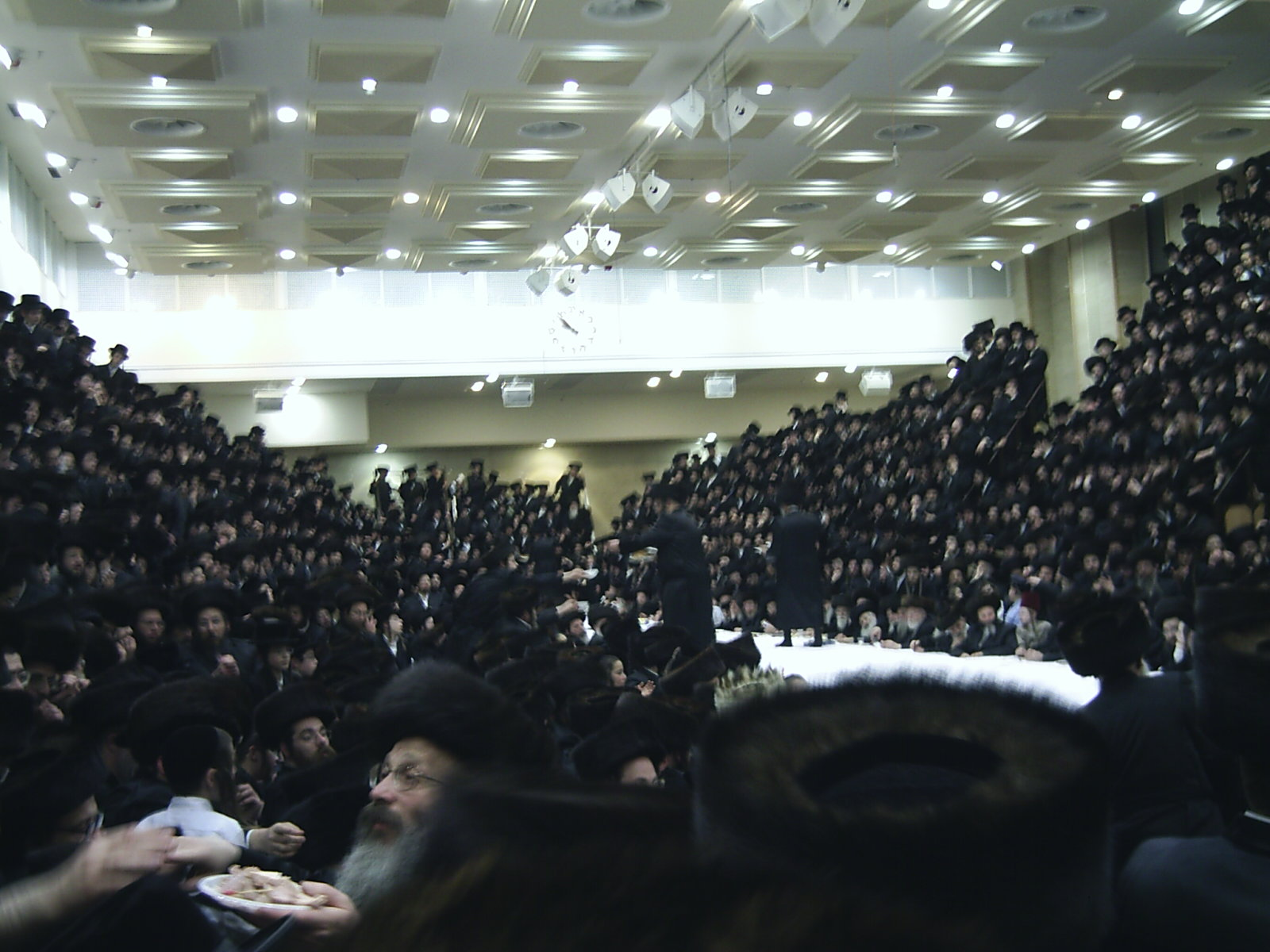 Belzer tish Purim 5766. Zelf gemaakt.